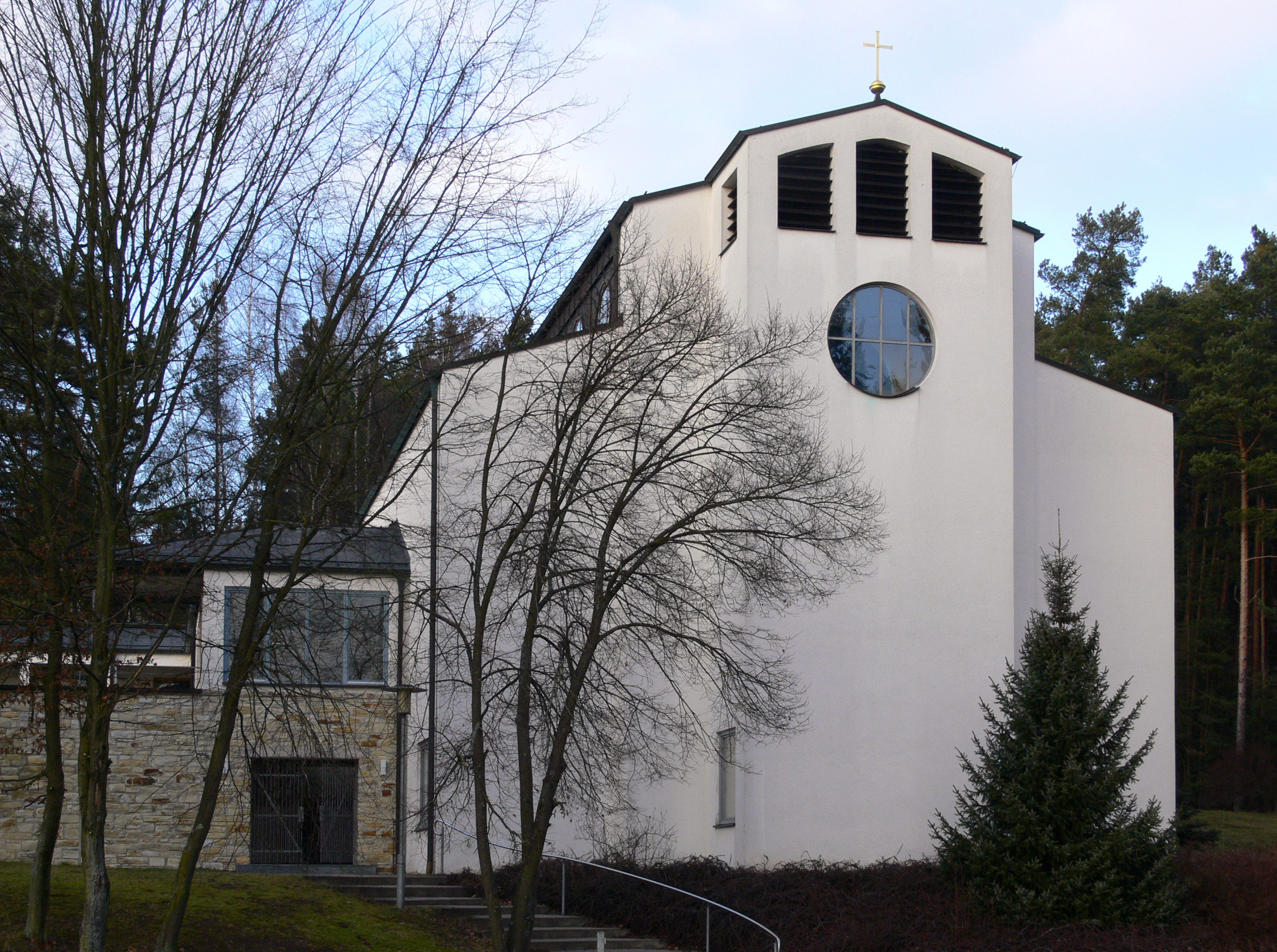 Filialkirche Heilige Dreifaltigkeit in Mühlstetten (Röttenbach) Am Scharzenberg 2